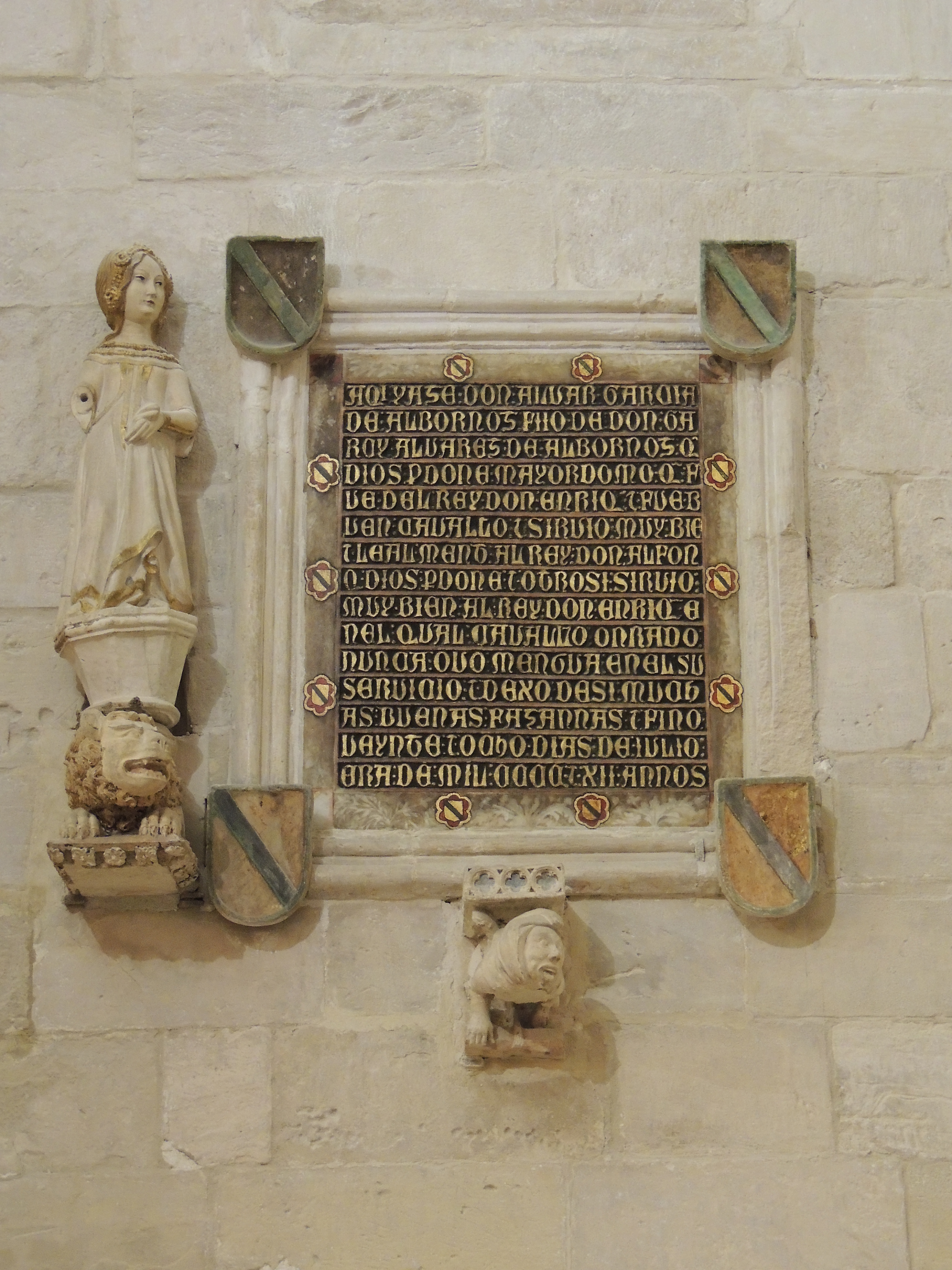 Lápida de Alvar García de Albornoz († 1374), en la catedral de Cuenca, (España). Fue señor de Albornoz, de Torralba, Utiel, Beteta y Moya.